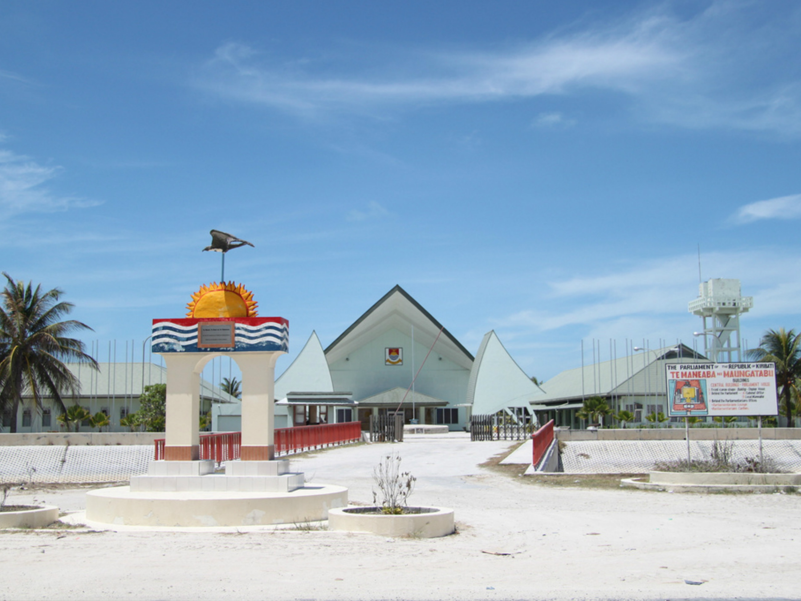 kiribati, parliament, south tarawa, tarawa